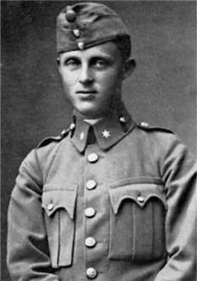 Il sottotenete d'artiglieria Gunther Langes nel 1916 con la divisa dell'esercito austro-ungarico